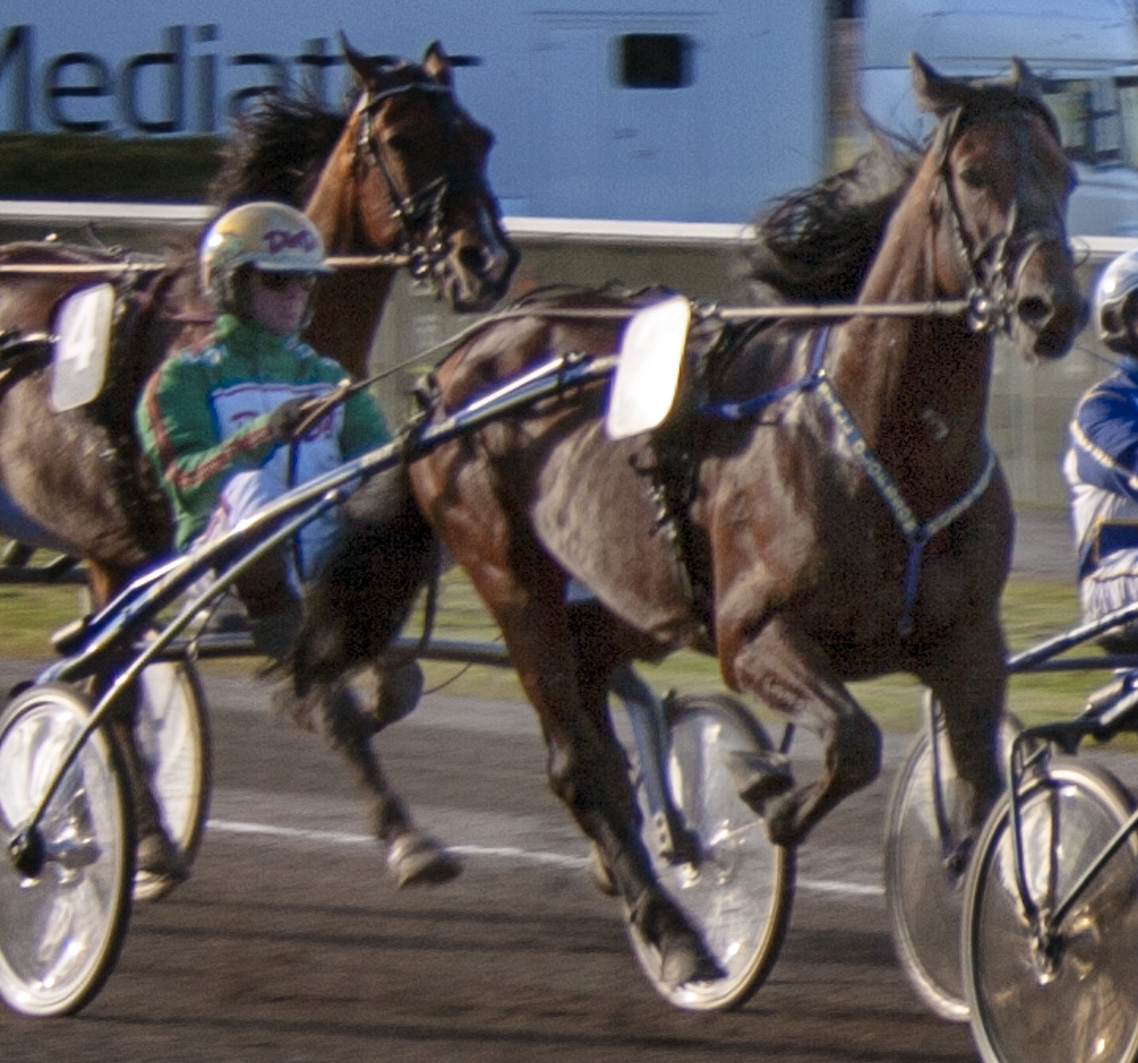 Spring Erom under Svensk Mästerskap 2010 på Åbytravet. Körd av Björn Goop